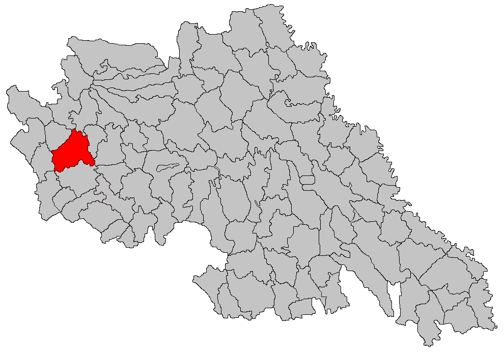 Categorie:Hărţi ale judeţului Iaşi